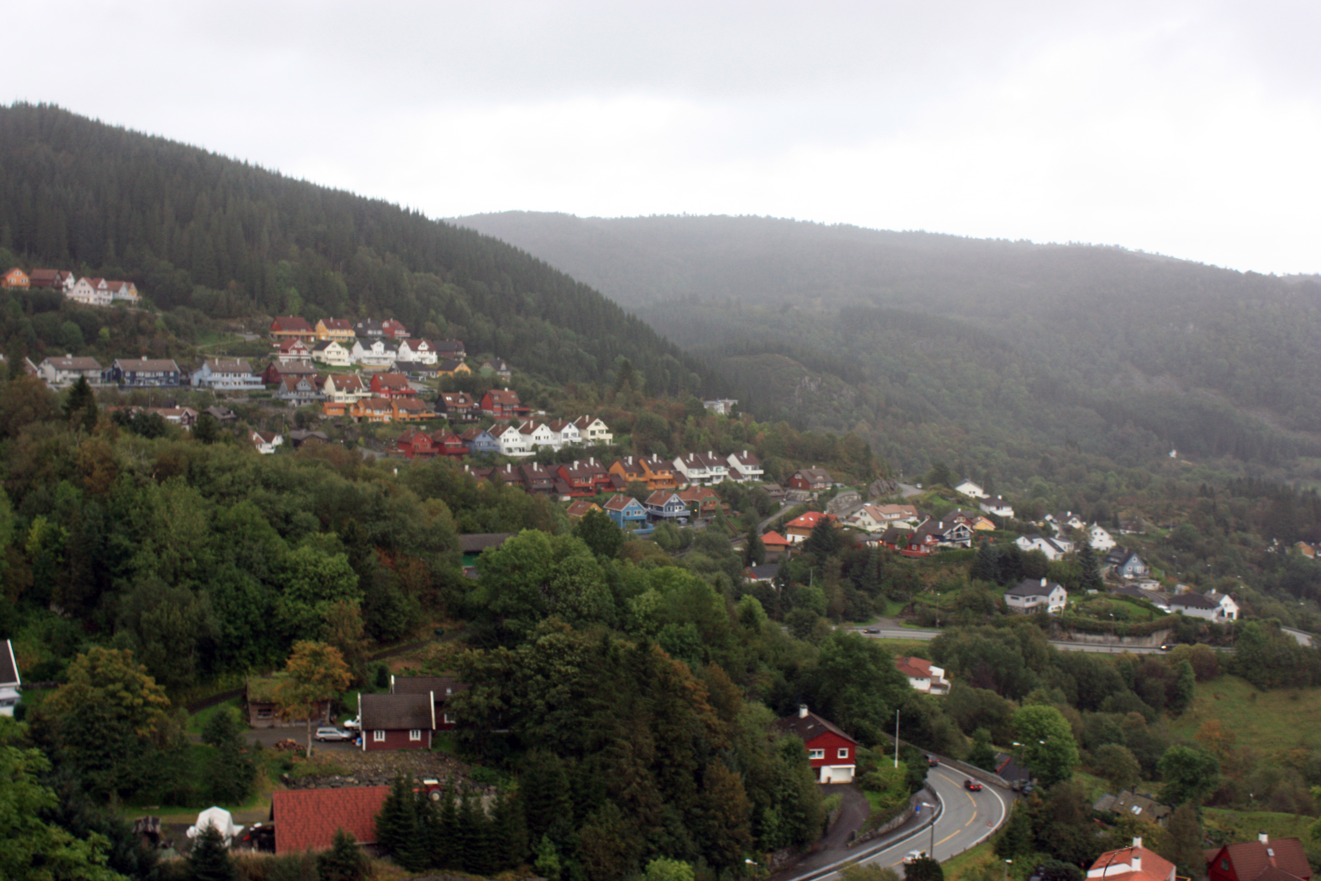 Vallaheiane, Fana, Bergen.